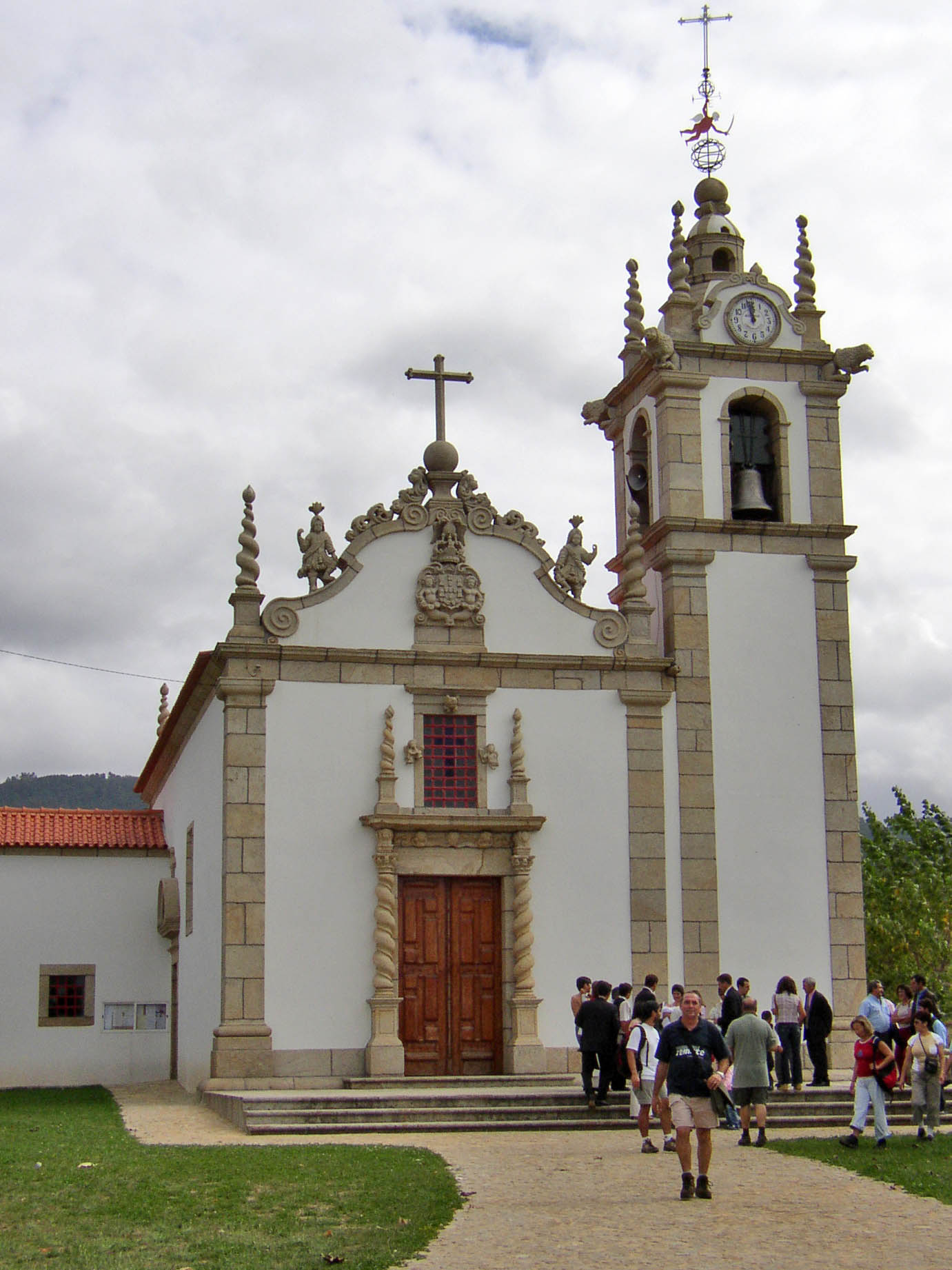 Igreja de Roge, vale de Cambra